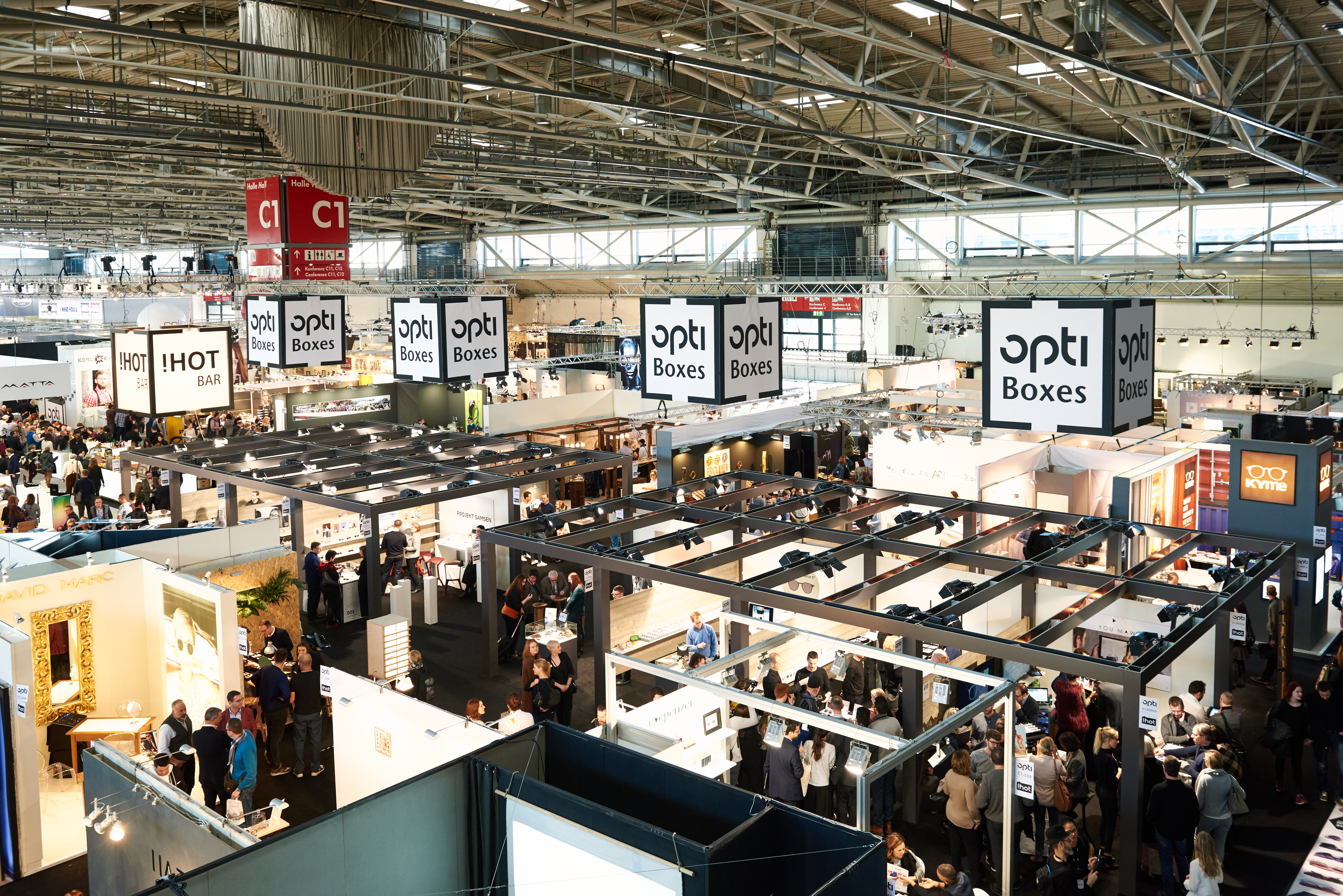 opti 2017 !HOT Area